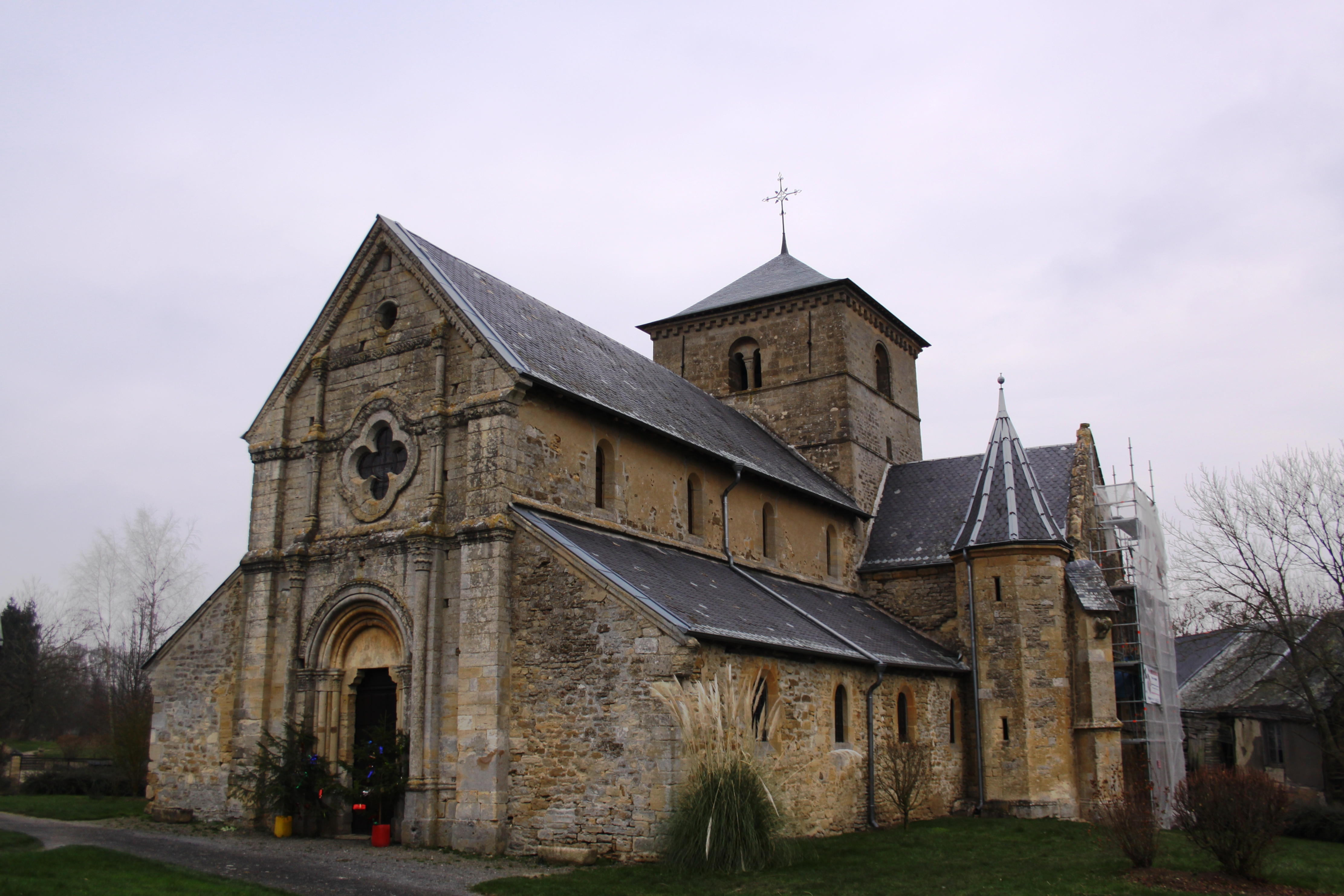 Église Notre-Dame de Sorcy-Bauthémont (Ardennes, France) .